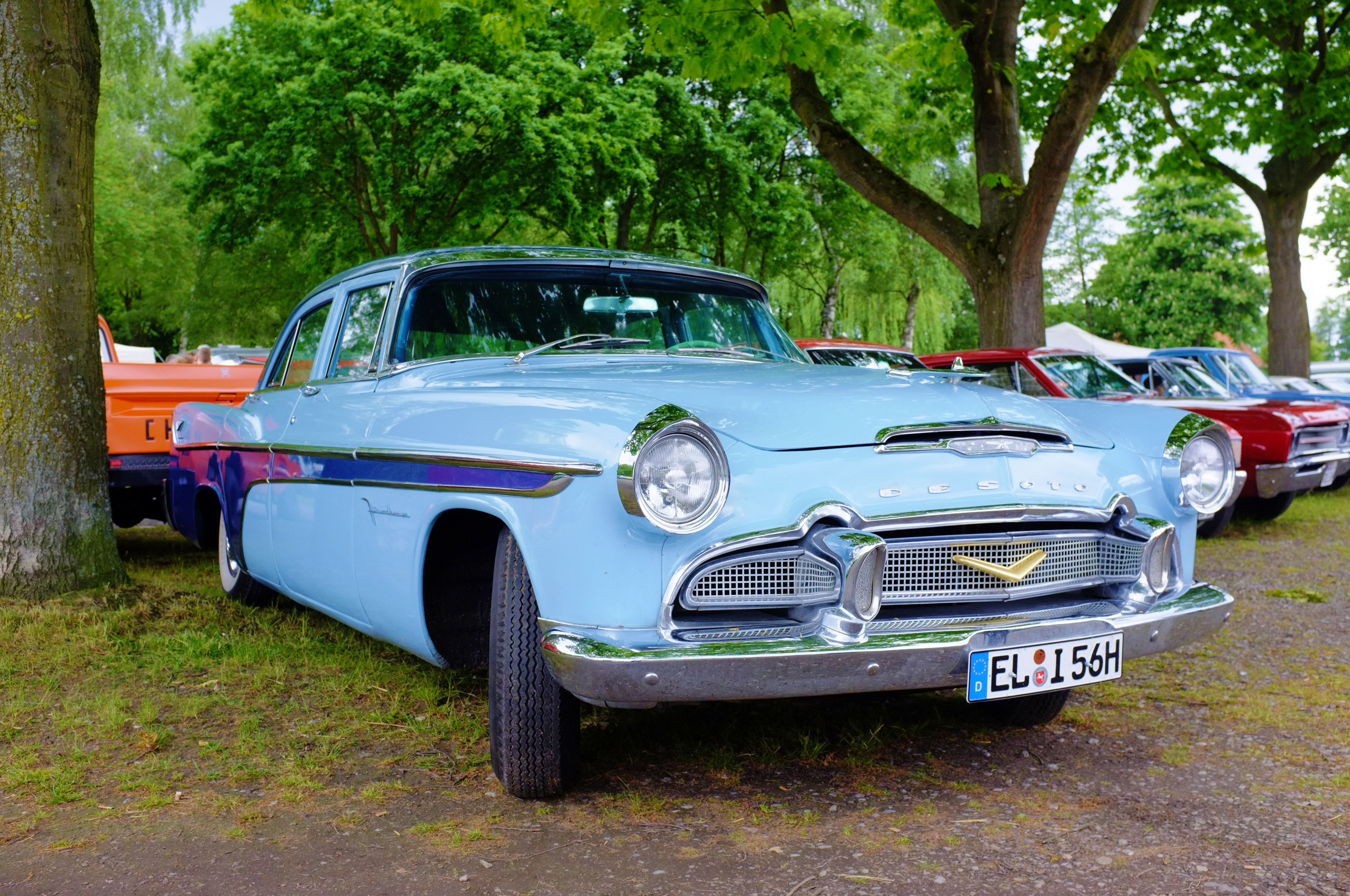 Straßenkreuzertreffen Kaunitz 2015